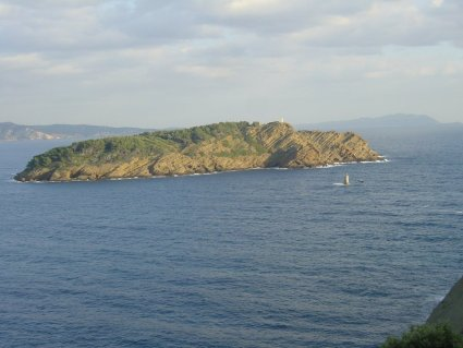 photo de l'île Verte, La Ciotat